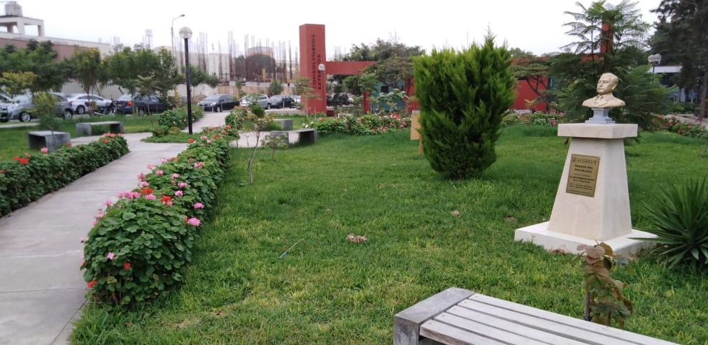 UNMSM Facultad de Psicología 2019 - Parque del Psicólogo